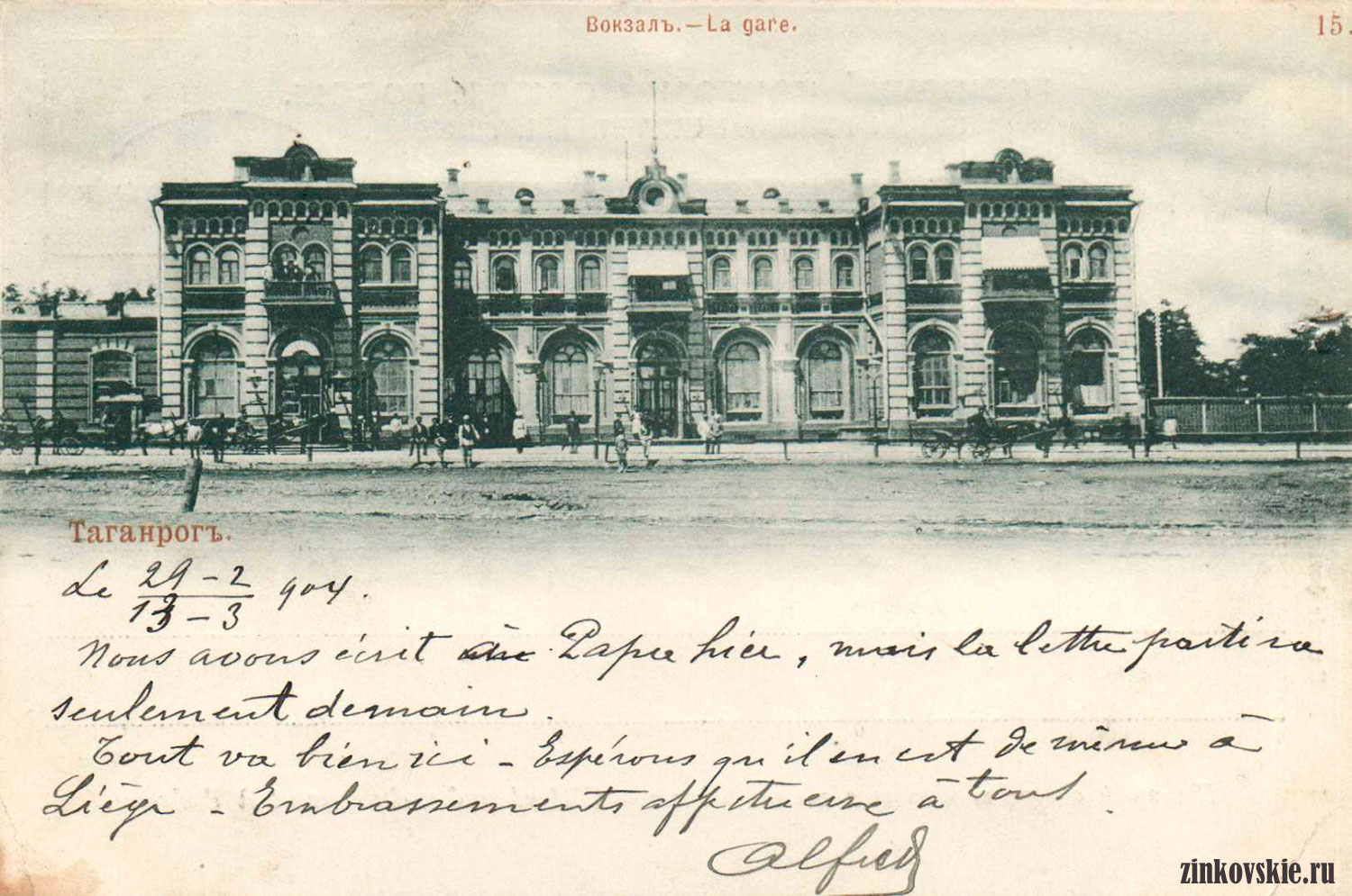 Здание железнодорожного вокзала, Таганрог Ростовская область РФ